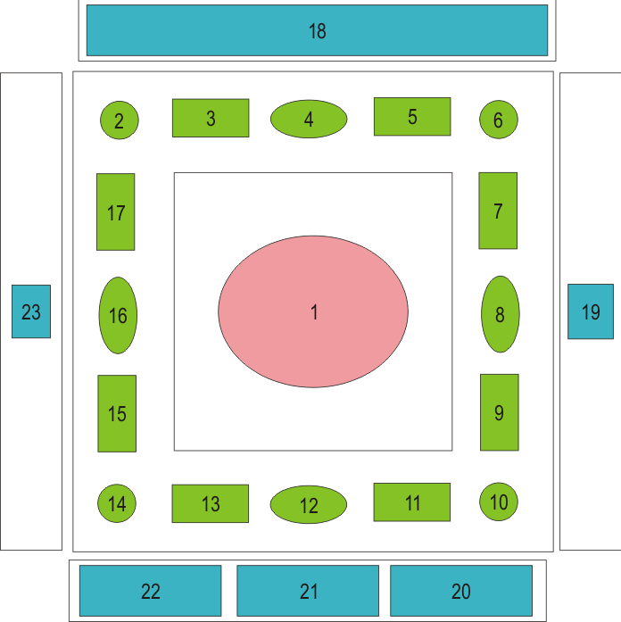 Scuola Grande di San Rocco in Venice, Sala delll Albergo